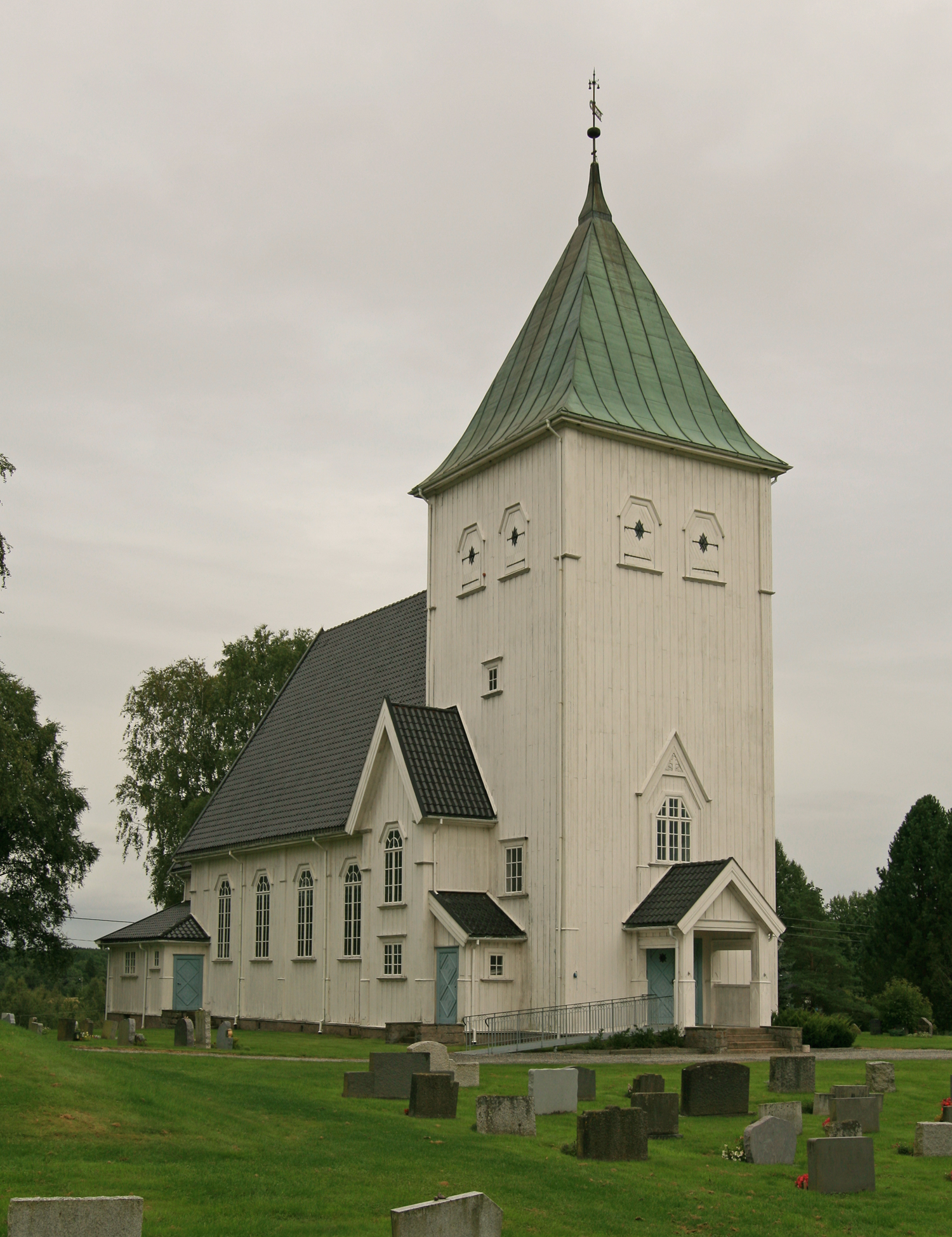 Frogner church, Sørum, Akershus, Norway.